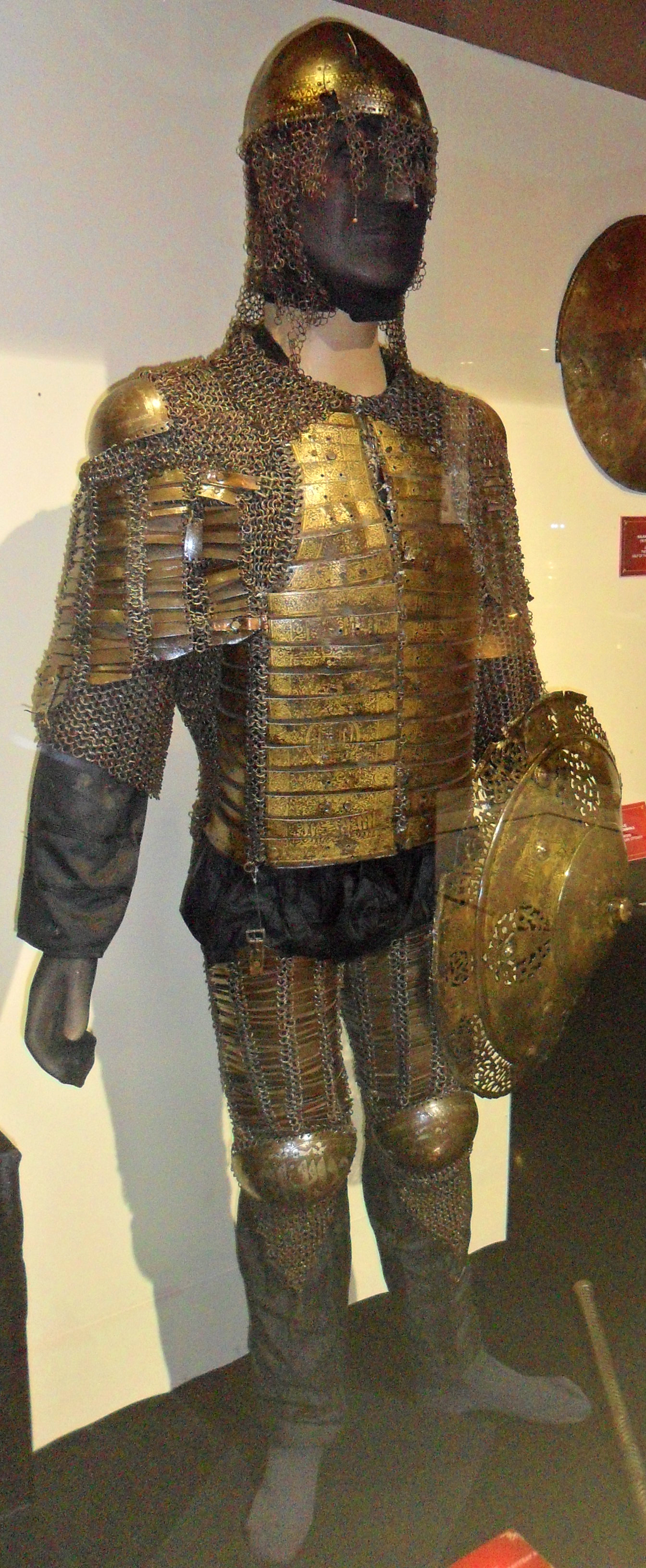 Mersin Deniz Müzesinde sergilenmekte olan Kayıtbay'a ait tombak zırh. Zırh, I. Selim tarafından Mısır Seferi dönüşünde ganimet olarak getirilmiştir. Örme demir zincir arasındaki levhalar üzerinde kufi yazıların yanında bitkisel motifler, kıvrımlar, dal ve çiçekler bulunmaktadır.